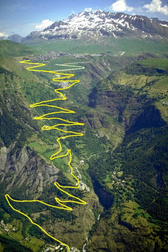 Suite à une erreur dans le fichier publié, j'ai mis à jour le fichier initial- Initial file wrong has been corrected